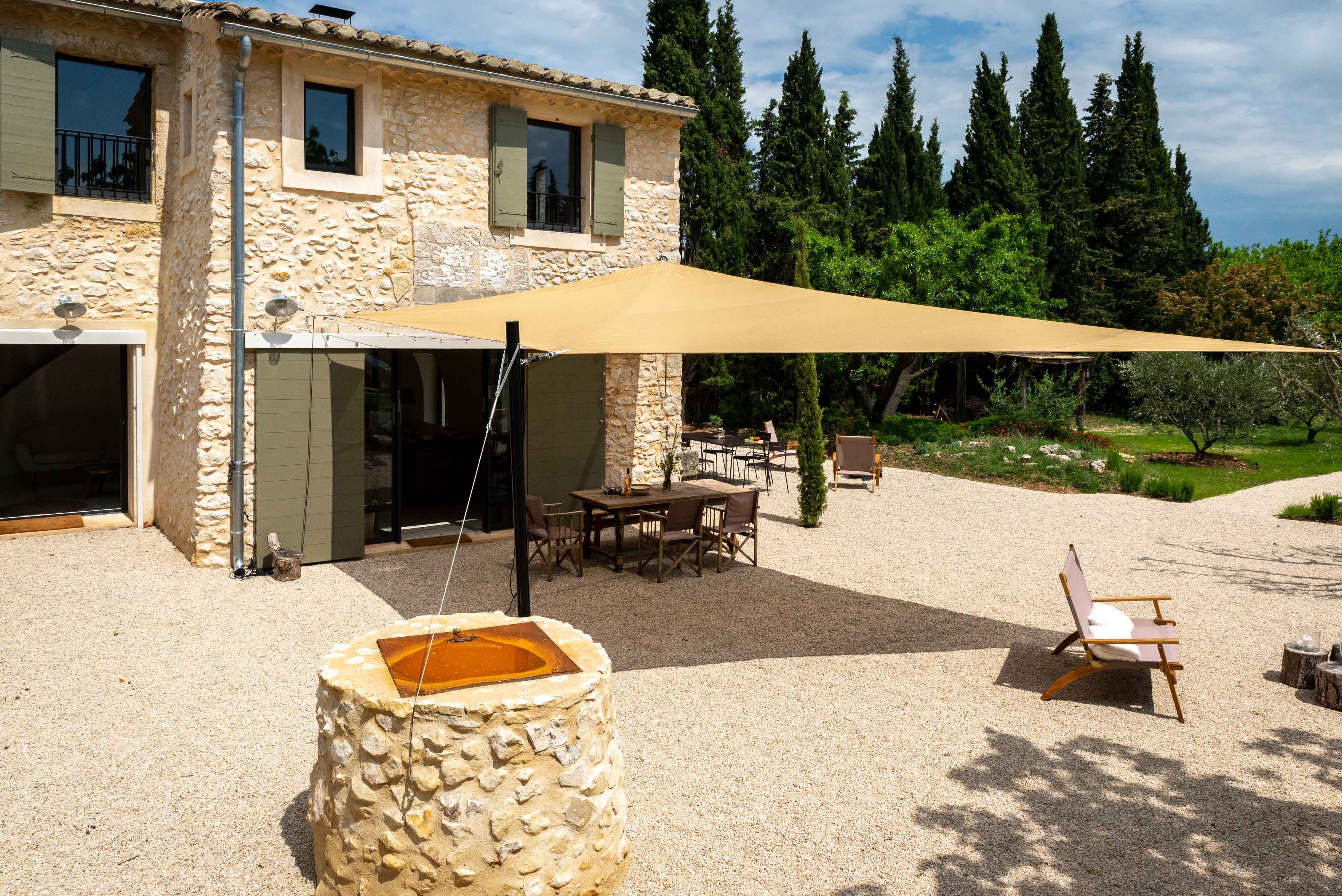 Ceci est une voile d'ombrage faisant de l'ombre sur une terrasse.